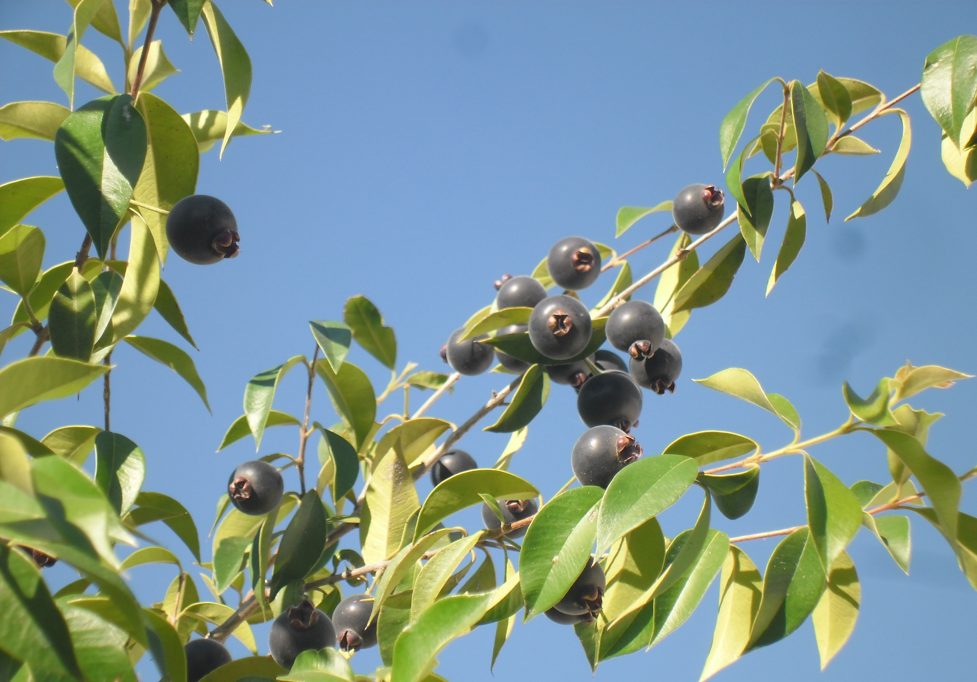 Guaviyú cargado de frutos, mediados de enero 2014, Pcia de Buenos Aires, Argentina.